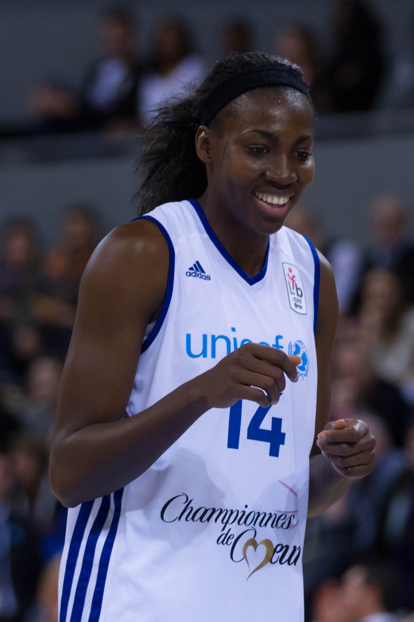 Djéné Diawara, match de gala championnes de cœur